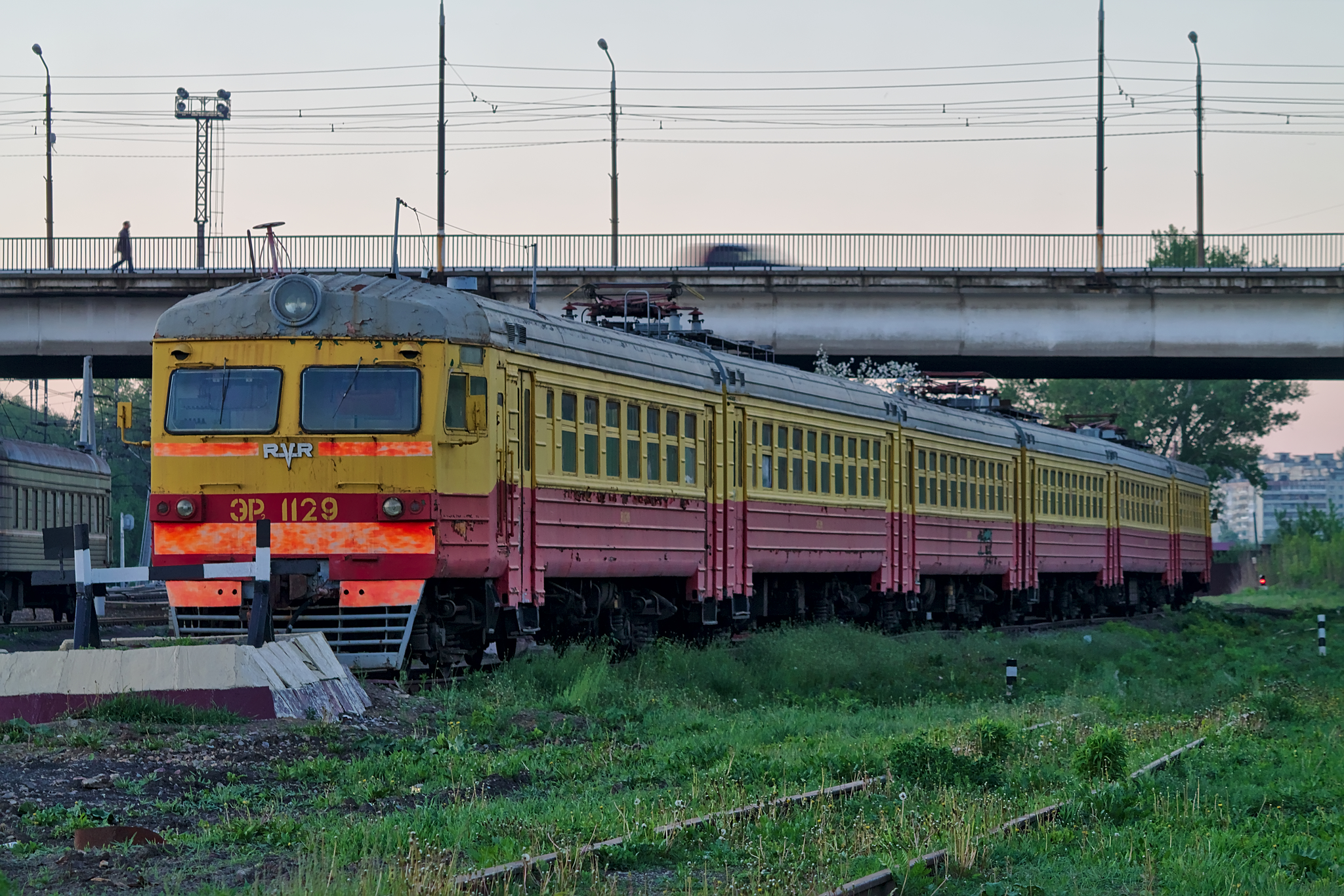 ЭР2-1149, станция Тула-Курская. см. фото 593328 в альбоме автора